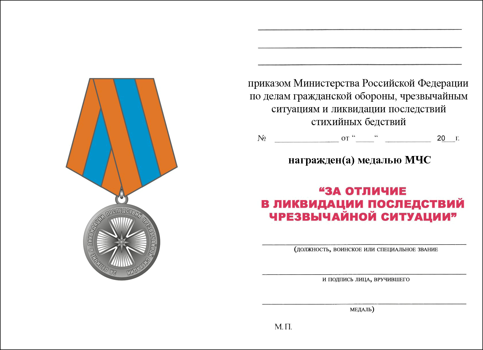 Удостоверение к медали «За отличие в ликвидации последствий чрезвычайной ситуации»